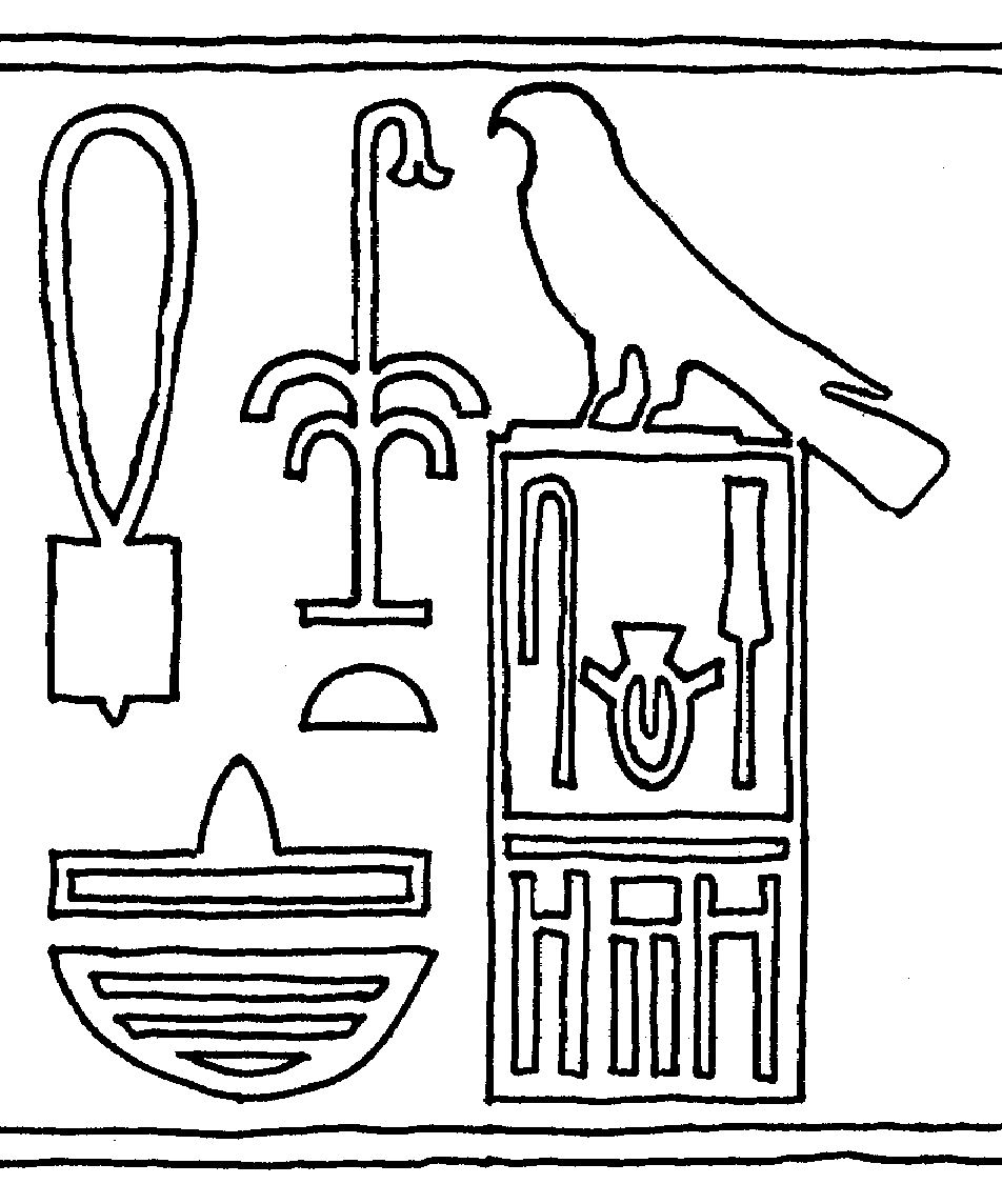 Siegelabdruck des hohen Beamten Nebhetep (2. ägypt. Dyn.)